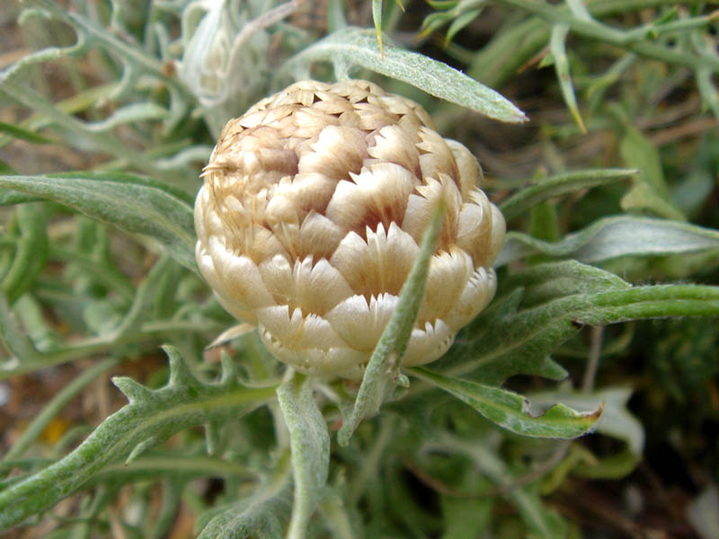 Leuzea conifera